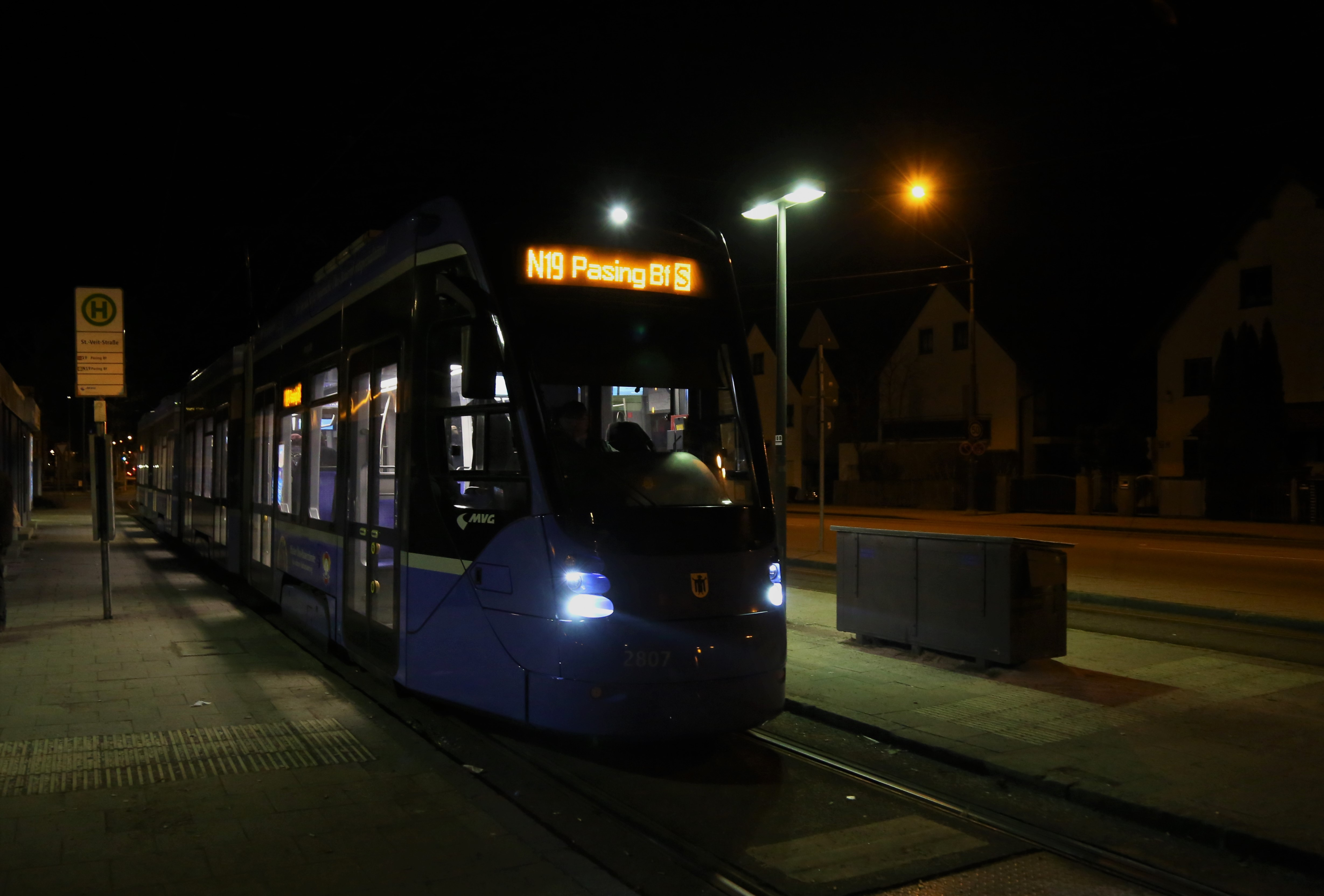 Tram N19 an der Haltestelle St.-Veit-Str.